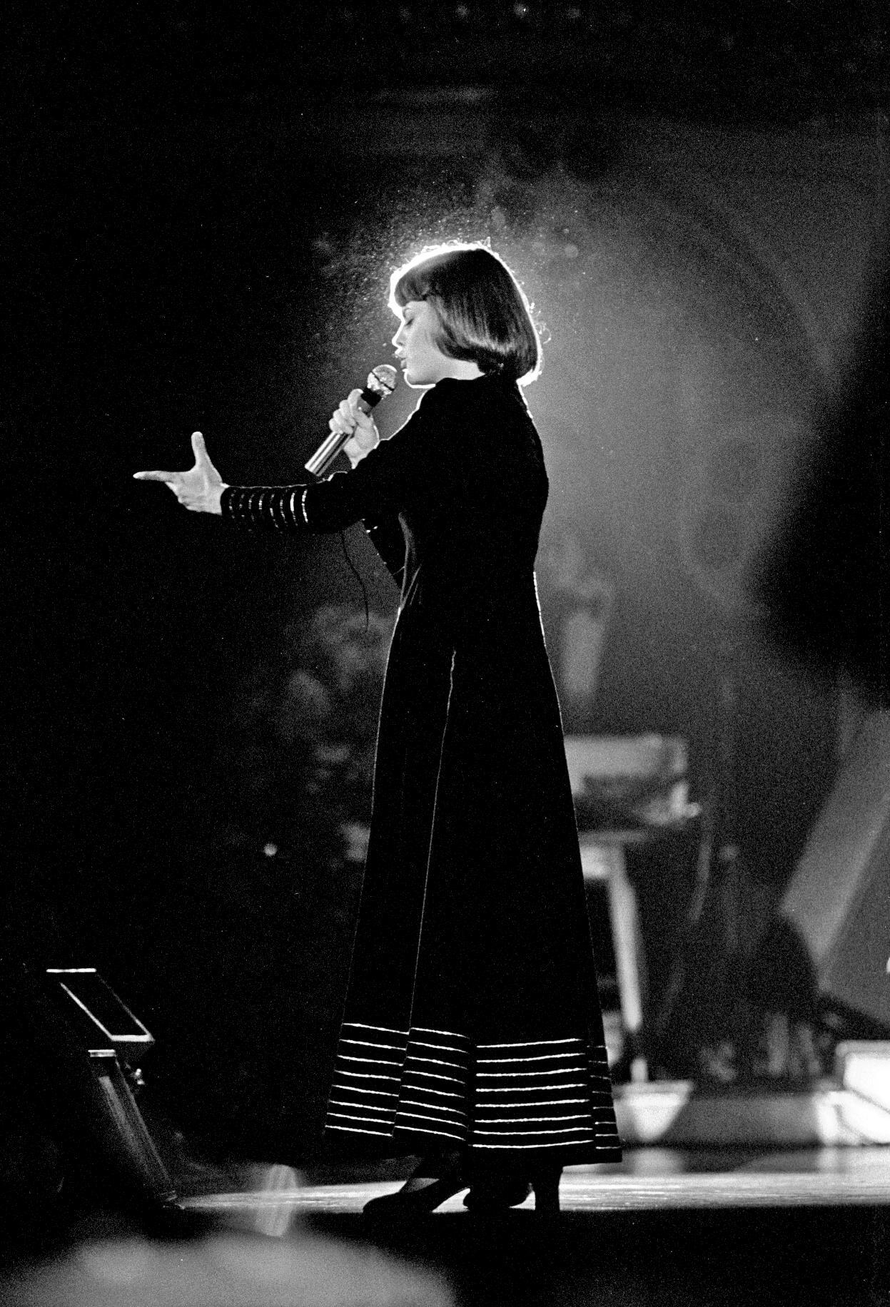 Mireille Mathieu in der Musikhalle Hamburg, 1971